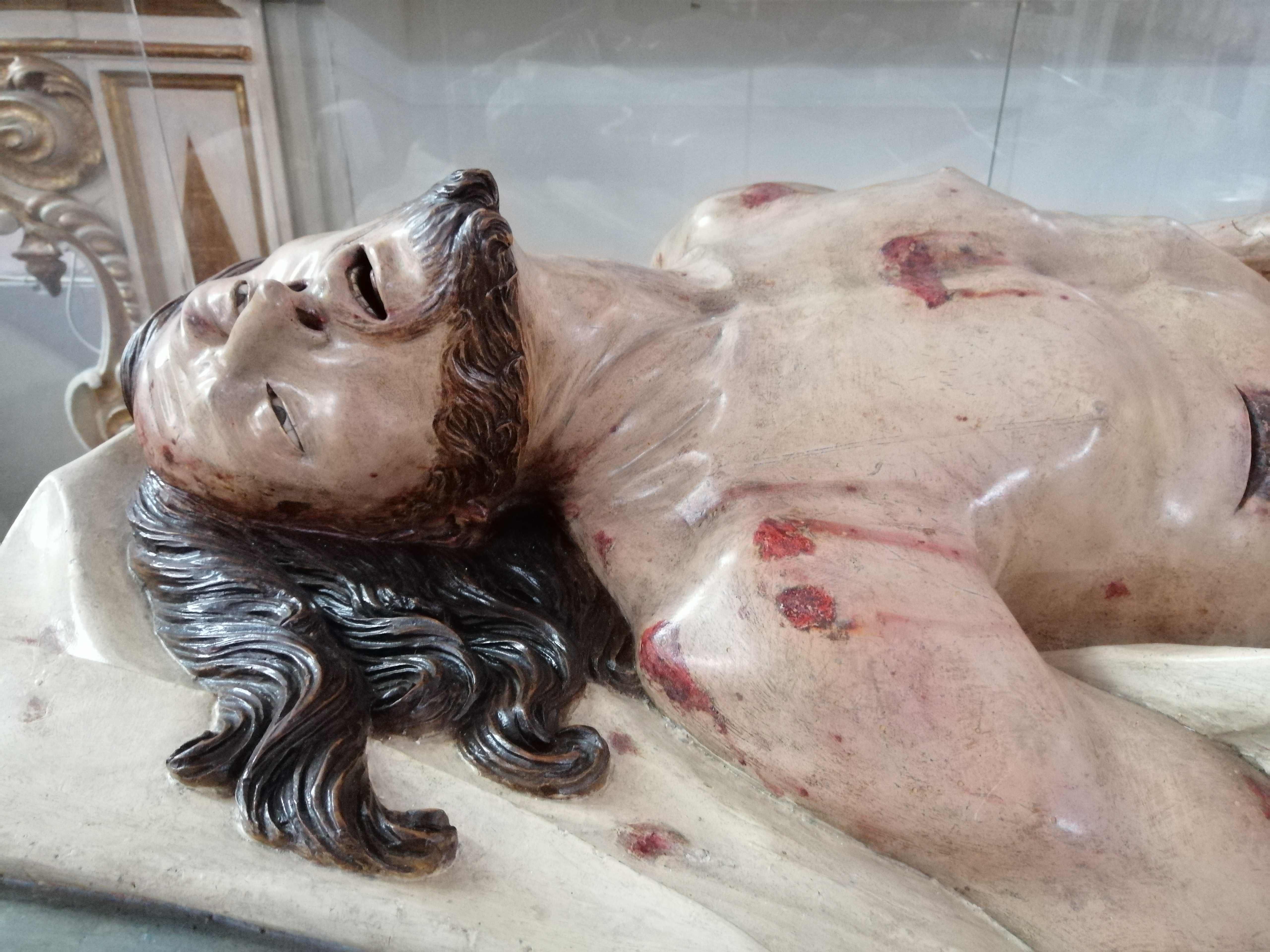 Scultura lignea del Cristo morto, opera di Carmine Lantriceni (1728), situata nella chiesa di San Tommaso d'Aquino, Congrega dei Turchini, a Procida. Particolare della testa e torso.